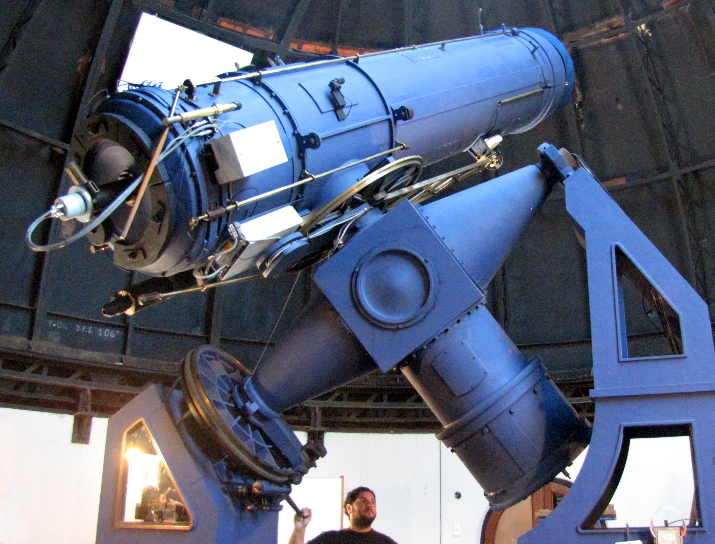 Telescopio Reflector Zeiss-Gautier. Observatorio Astronómico de La Plata. Facultad de Ciencias Astronómicas y Geofísicas (UNLP)